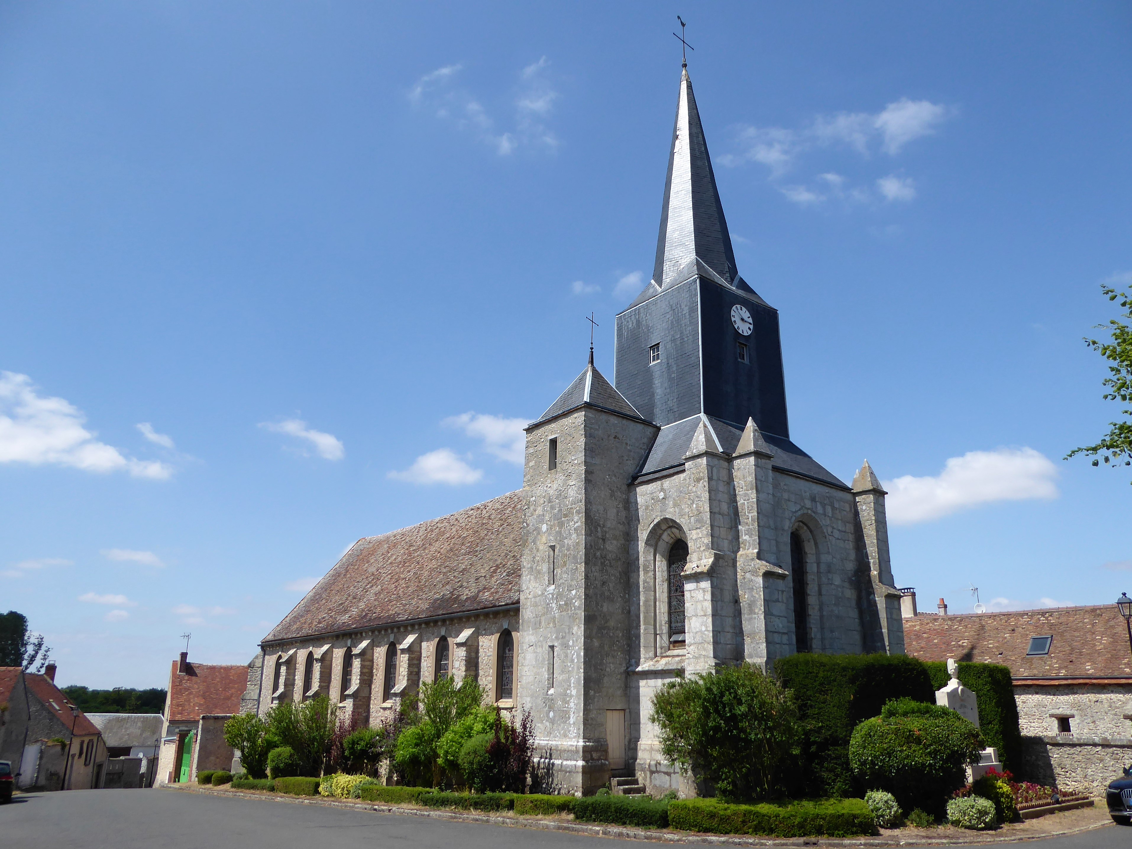 abside et clocher de l'église Saint-Léger de Saint-Léger-des-Aubées, Eure-et-Loir, France.